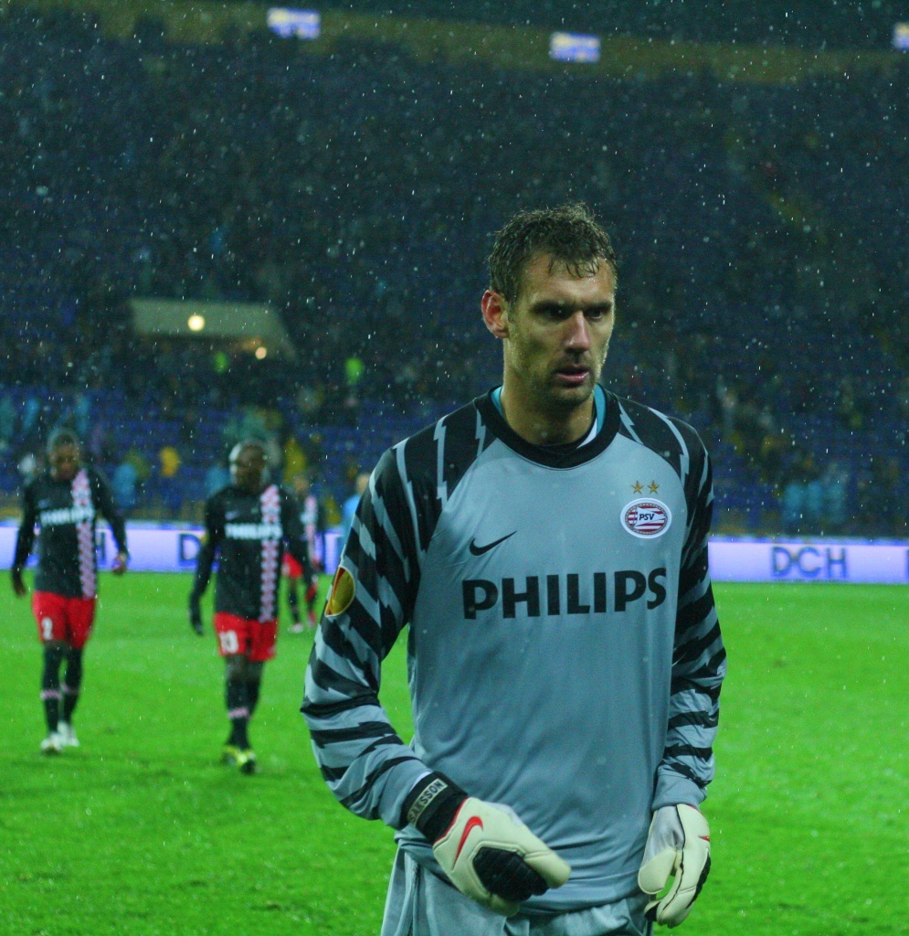 Андреас Иссаксон